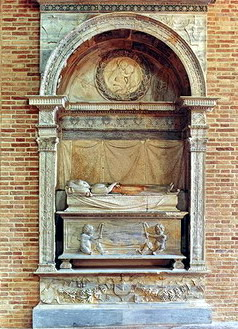 Tombe de Barbara Manfredi à Forli (Italie)